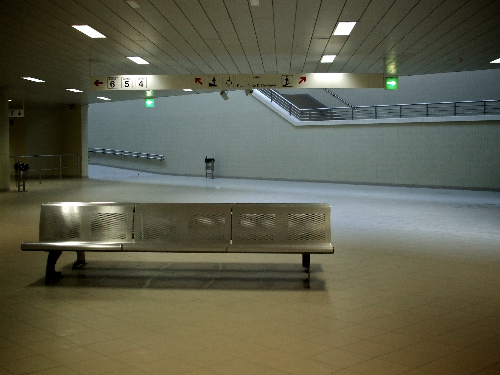 Tipo: EC [Estação de Concentração] Local: Pinhal Novo [Linha do Sul, PK 36 • Linha do Alentejo, PK 15] Data e hora: 29 de Março de 2010 [19h22]